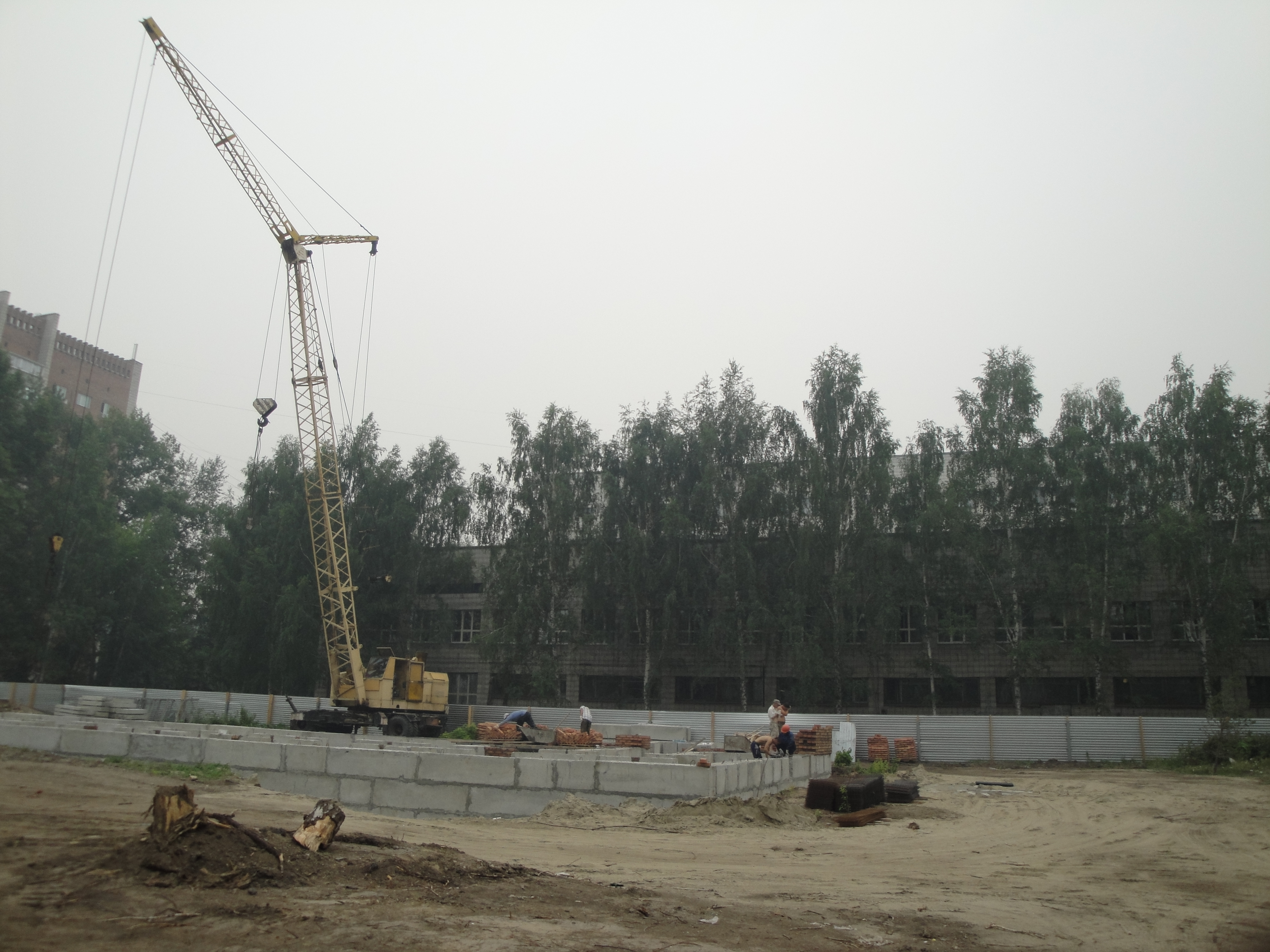 Пневмоколёсный кран КС-5363 на строительстве административного здания по улице Танкистов, Новосибирск. Общий вид